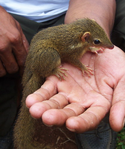 Tupaia sp., probably javanica, from Mancak, Serang, West Java, Indonesia.